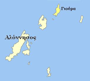 Η θέση της νήσου Γιούρα στο χάρτη